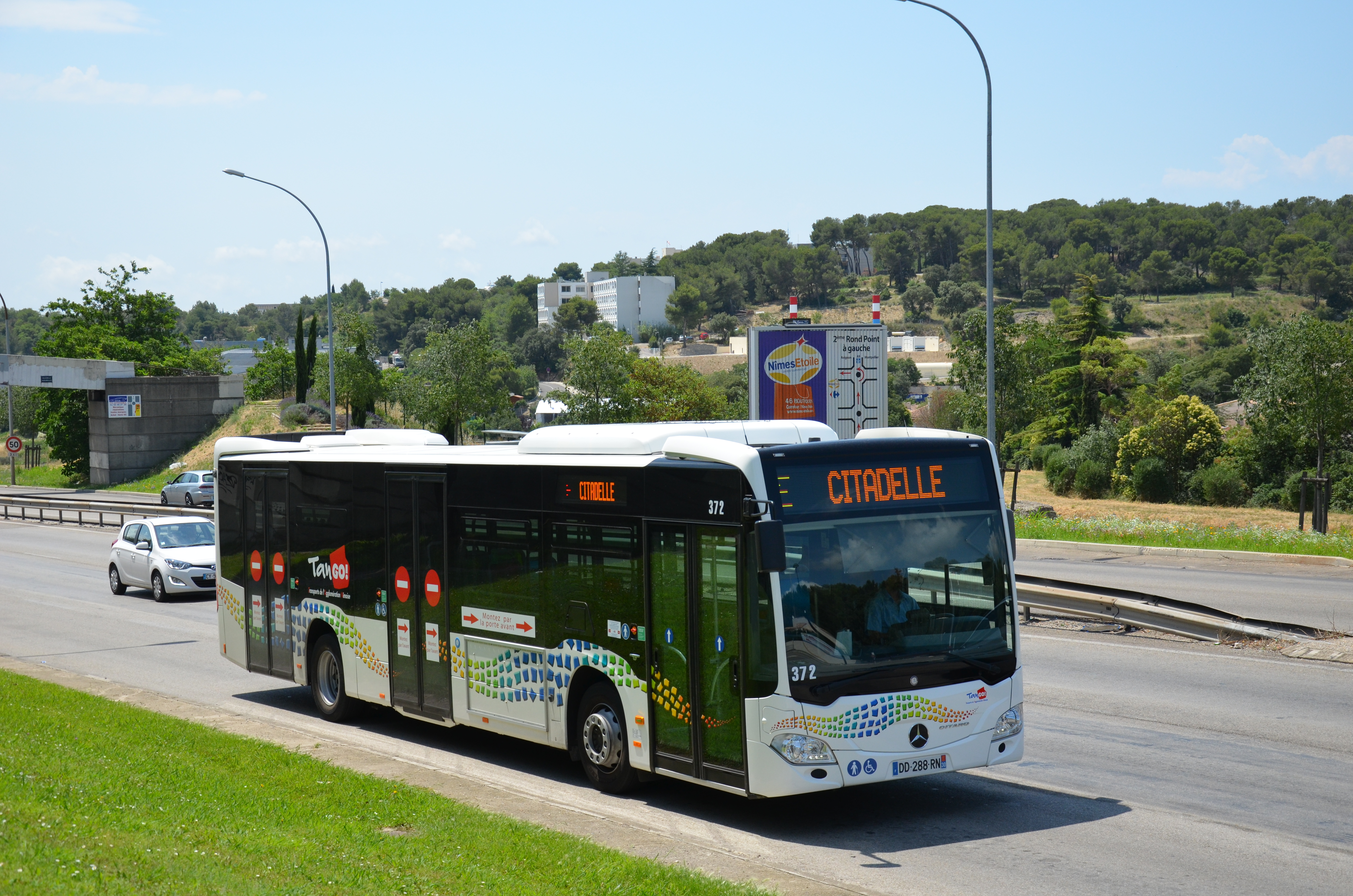 Mercedes Citaro C2 Tn°372 de la ligne E du réseau TANGO de Nîmes, près de l'arrêt Romarins.